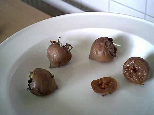 mispel, vrucht, eigen foto (public domain) De foto is niet zo scherp. Wanneer iemand een betere foto heeft gemaakt, dan deze graag vervangen. Ik heb hem iets scherper gemaakt. Rasbak 29 nov 2004 19:24 (CET)